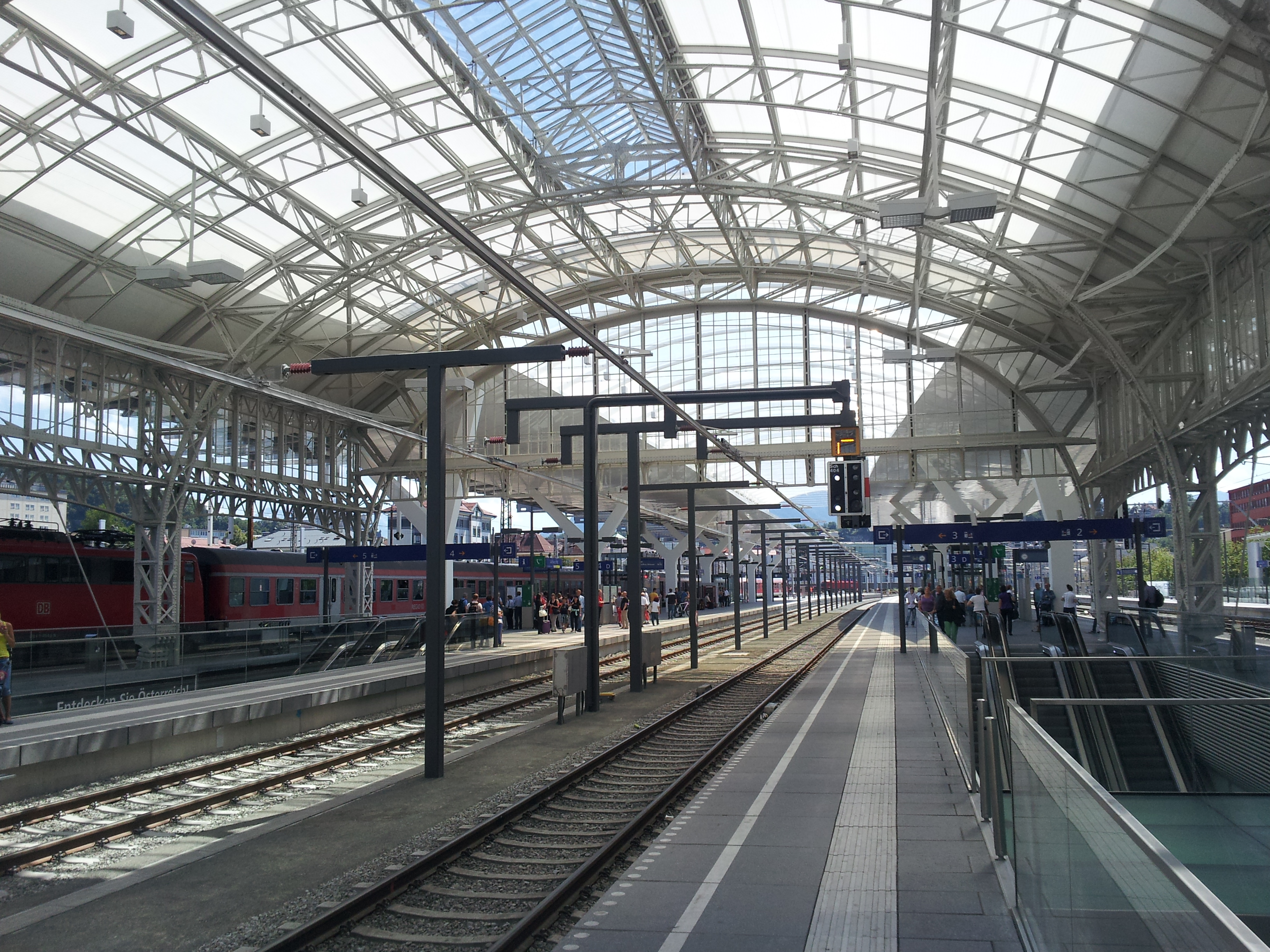 Salzburg Hauptbahnhof mit rekonstruierter Stahlkonstruktion des ehemaligen Mittelbahnsteiges